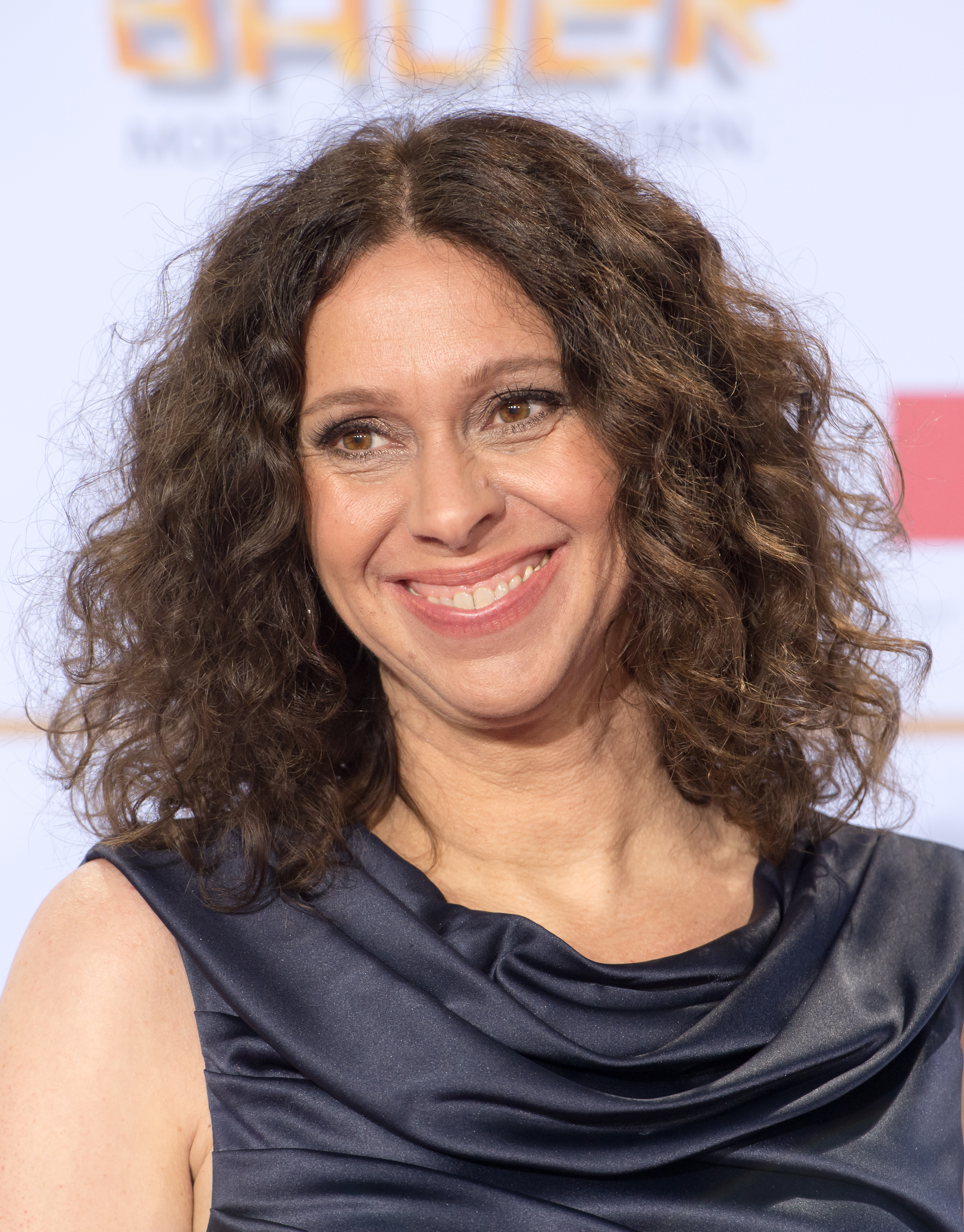 Elke Wiswedel beim Deutschen Radiopreis 2016 im Schuppen 52 in Hamburg